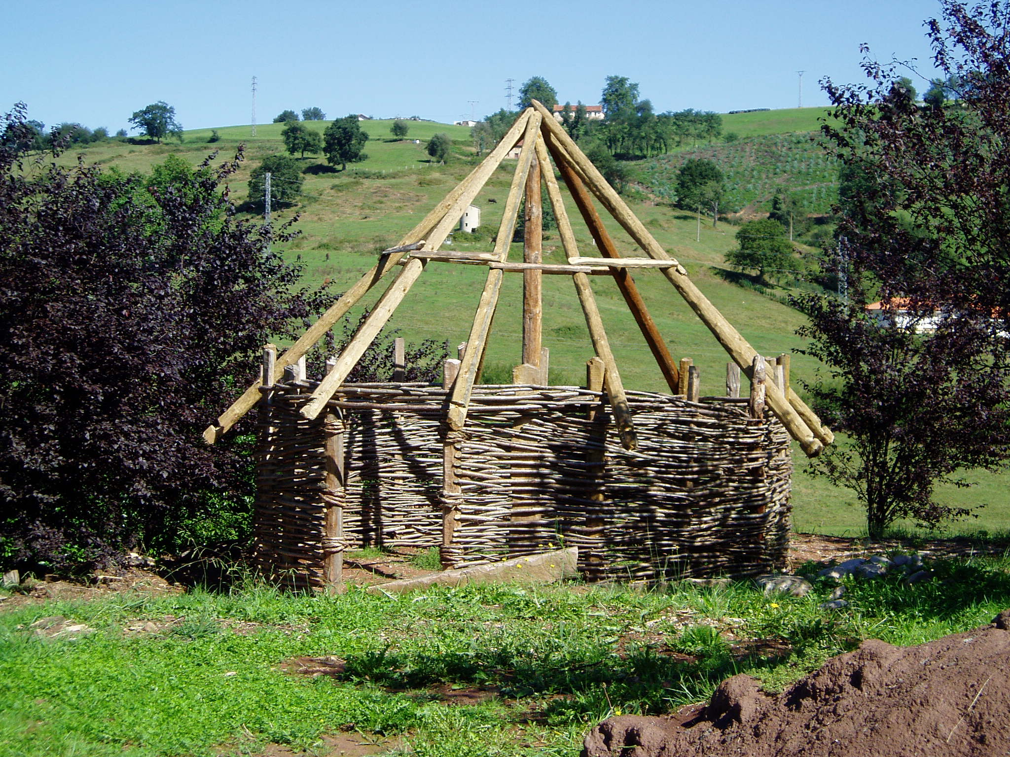 Construcción de cabaña en el poblado cántabro de Cabezón de la Sal